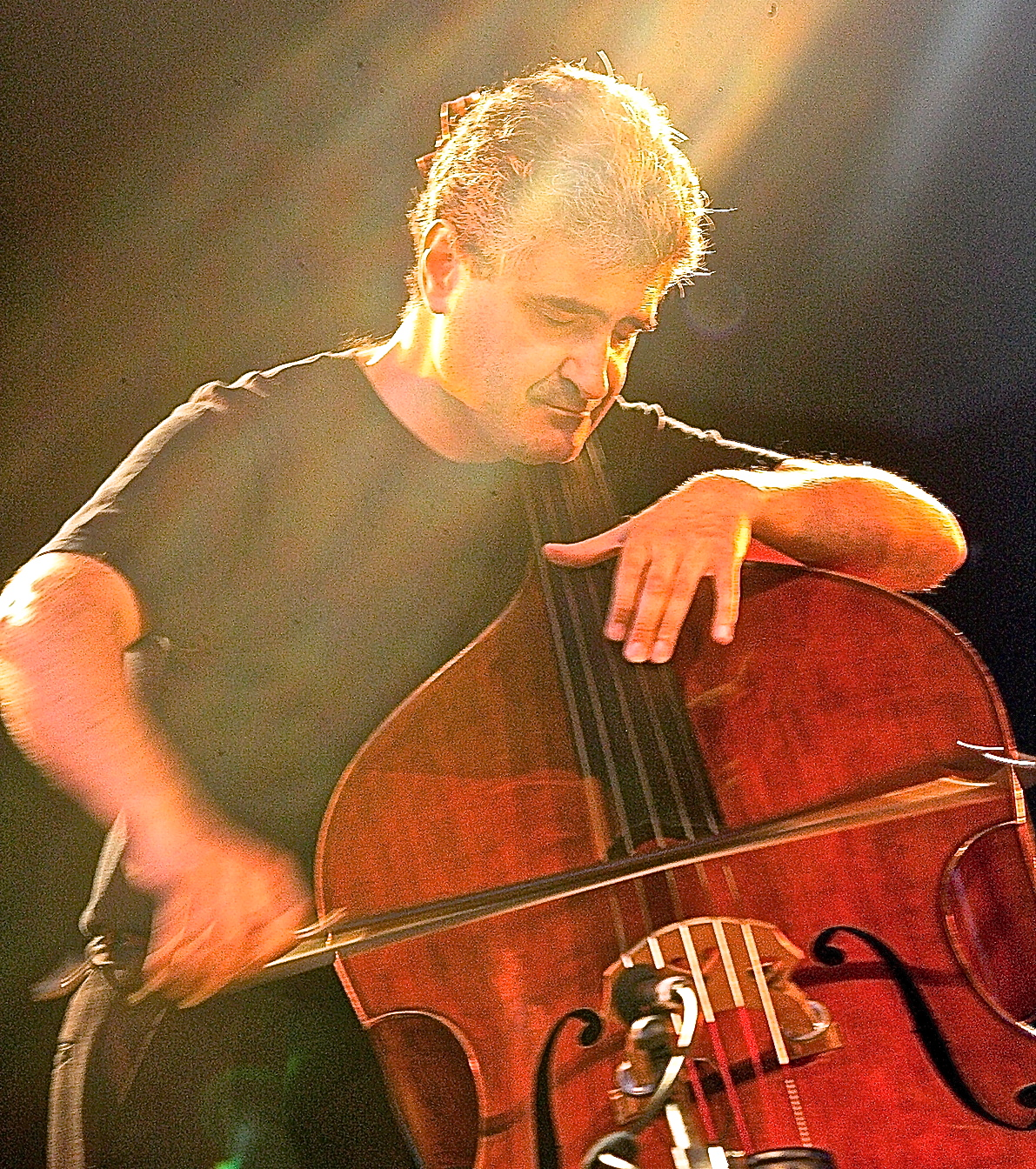 Renaud Garcia-Fons in concert